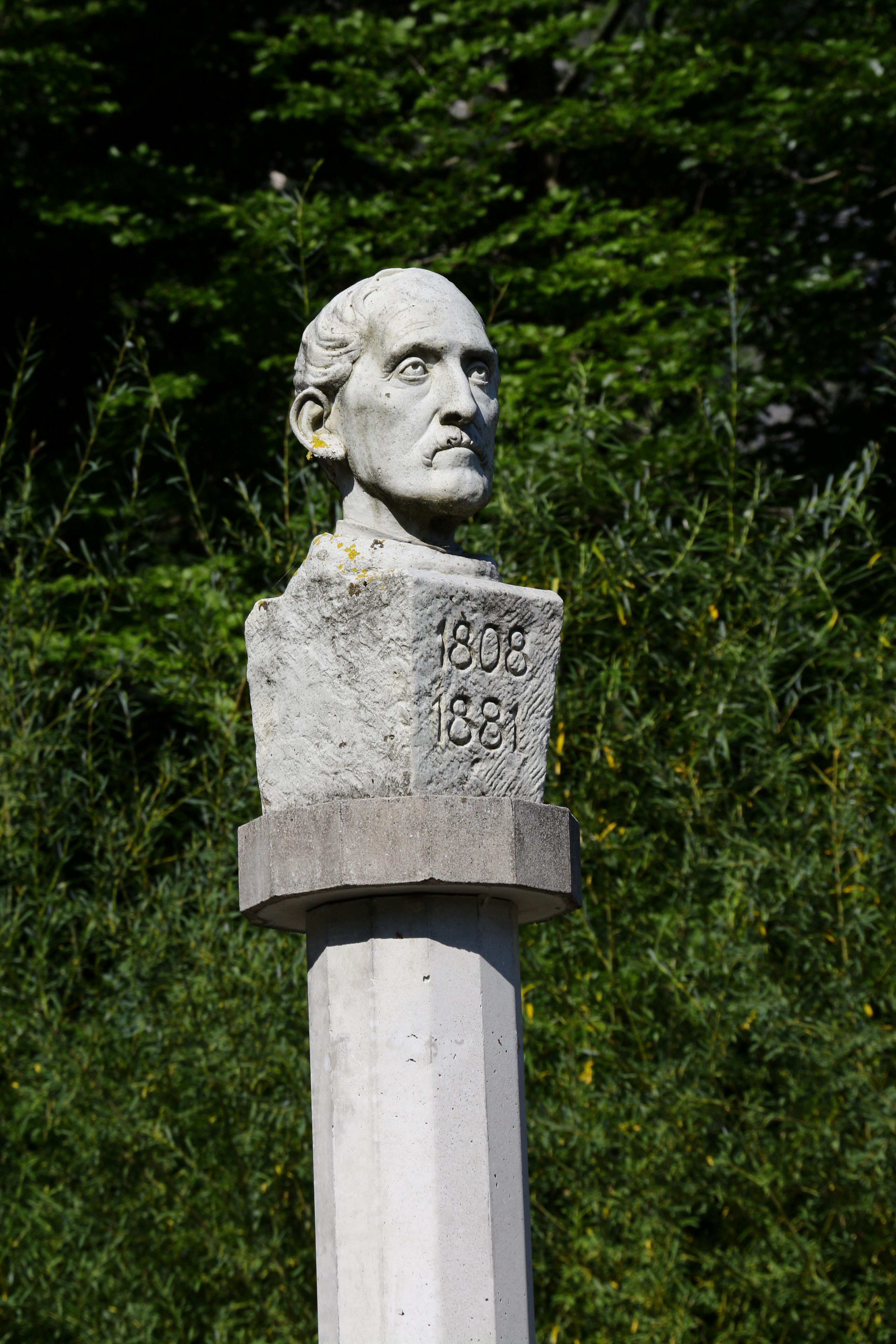 Teil des Objekts "Baumspirale" des Leube Skulpturenwegs in der Salzburger Gemeinde Grödig - Büste des Gründers der Firma Leube